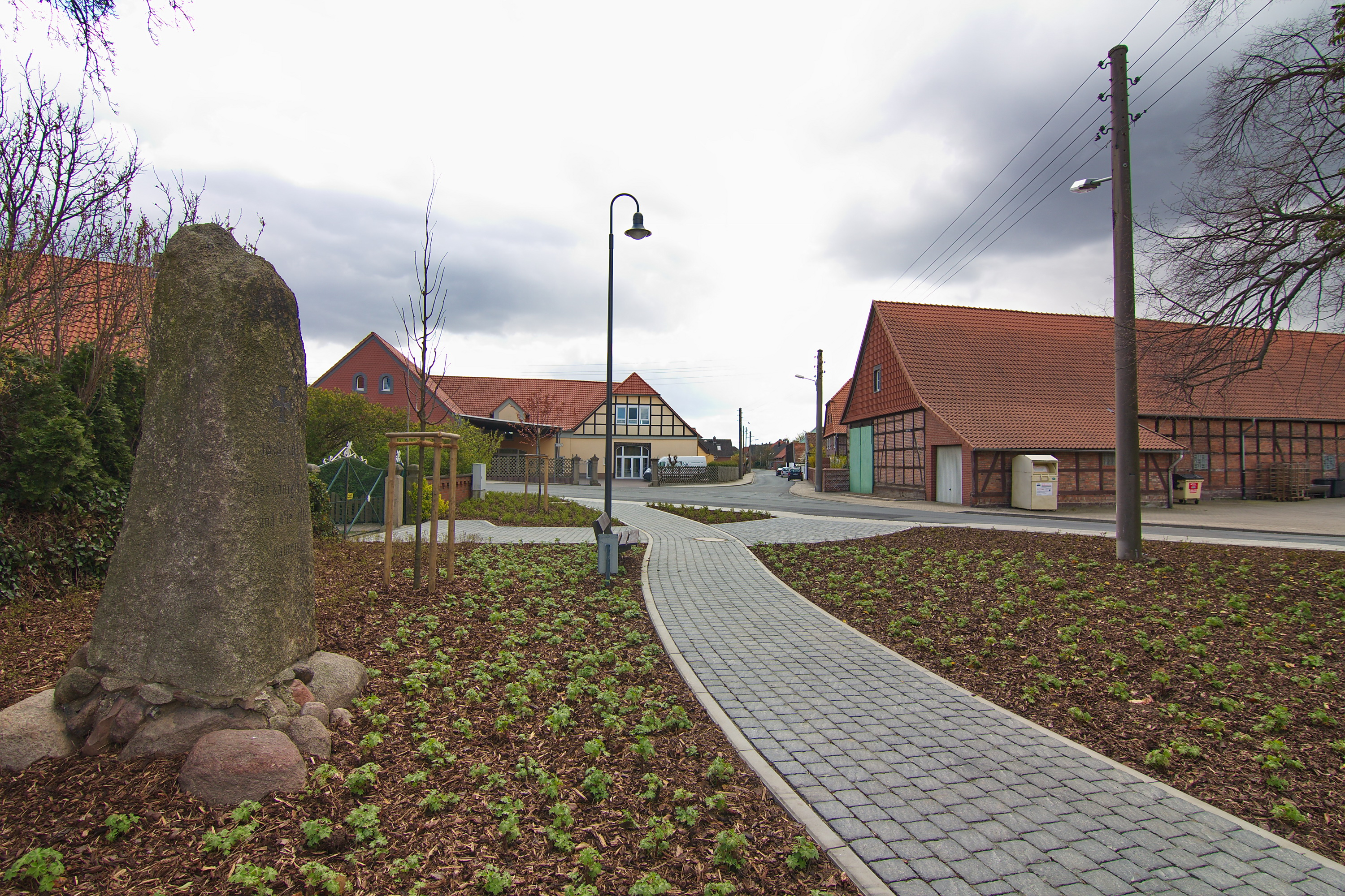 Ortsblick in Dungelbeck (Peine), Niedersachsen, Deutschland.